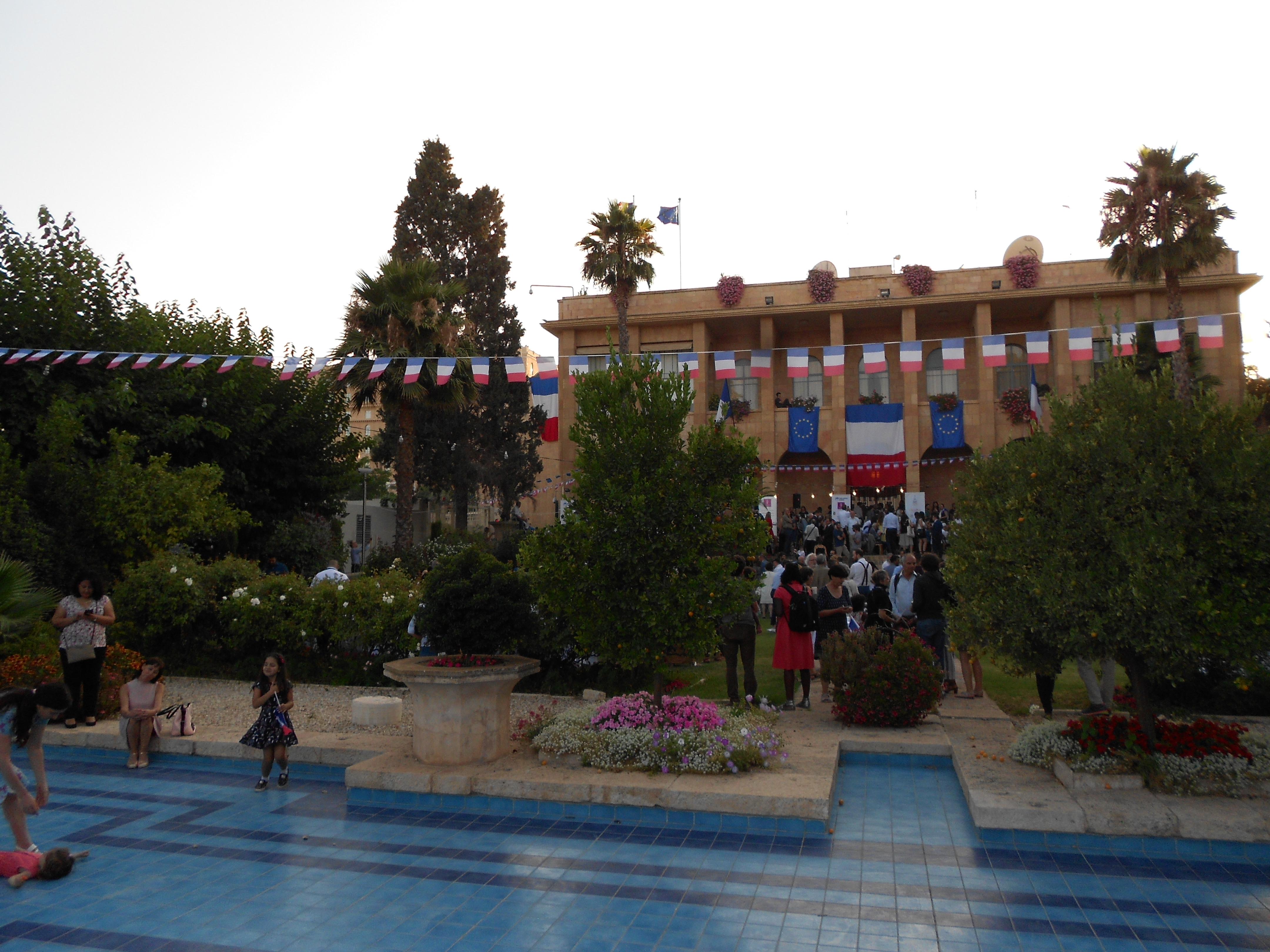 Finale de la Coupe du Monde 2018 retransmise au Consulat de France à Jérusalem le 15 juillet 2018